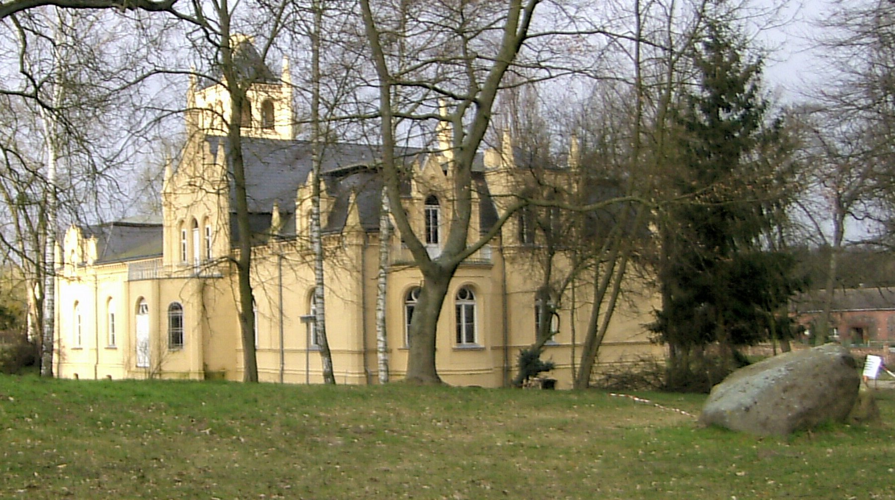 Gutshaus (Schloss) in Schönow (Uckermark)